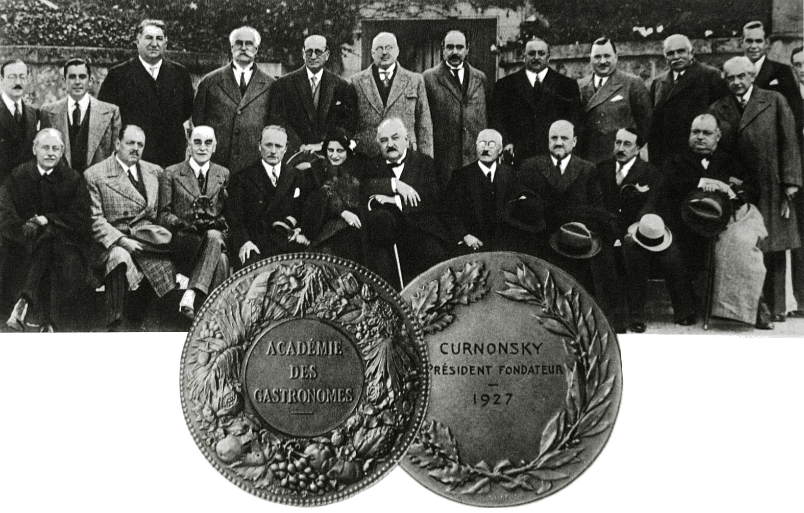 Académie des gastronomes en 1934